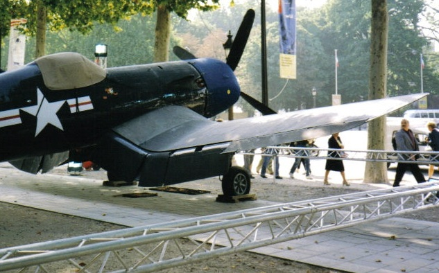 Ancien chasseur embarqué vu sur les Champs Elysées en septembre 1998.